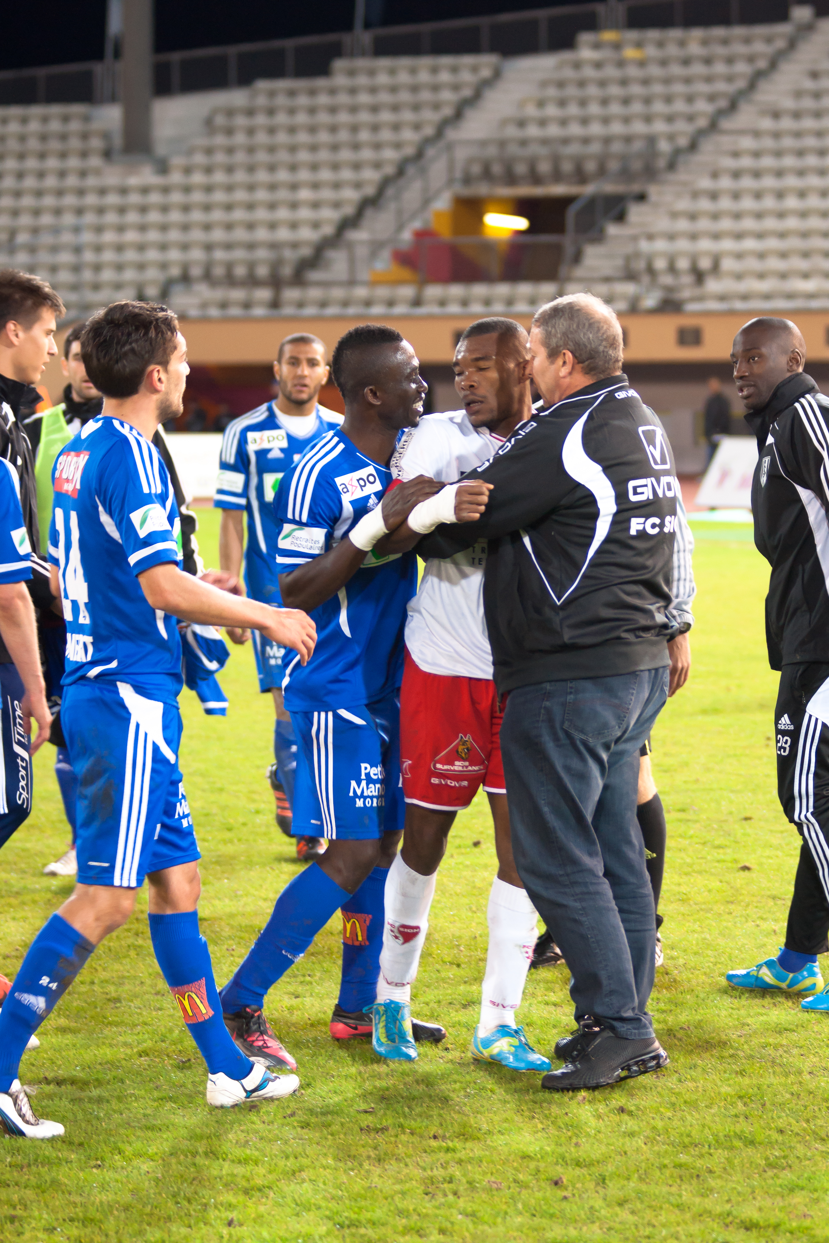 Serey Die (blanc au centre) à la fin du match opposant le Lausanne Sport au FC Sion le 2 mai 2012 à la Pontaise. Il est ici pris à parti par des joueurs du Lausanne Sport après qu'il ait adressé une gifle à un ramasseur de balle.